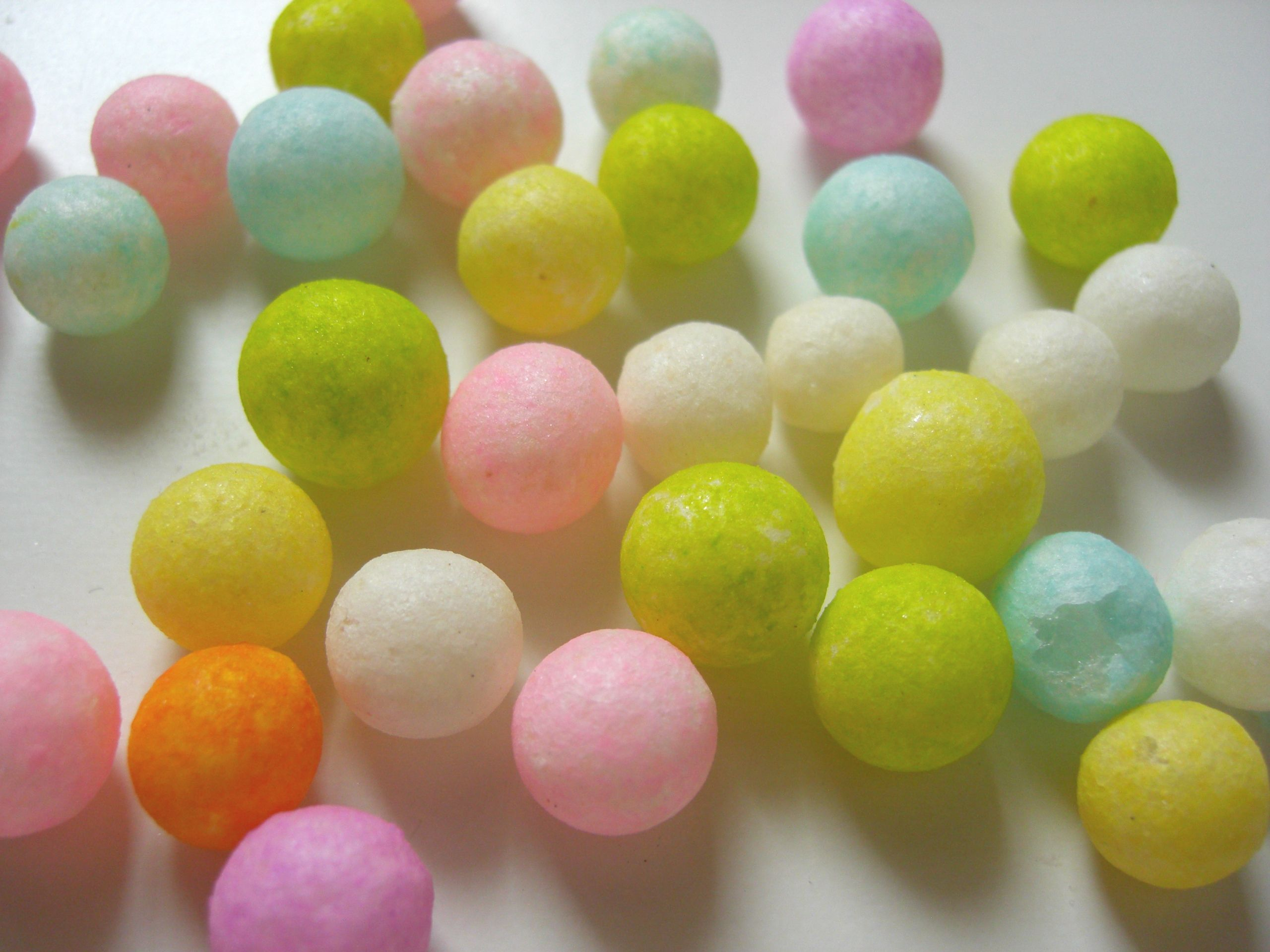 おいり（商品名さぬきのおいり）